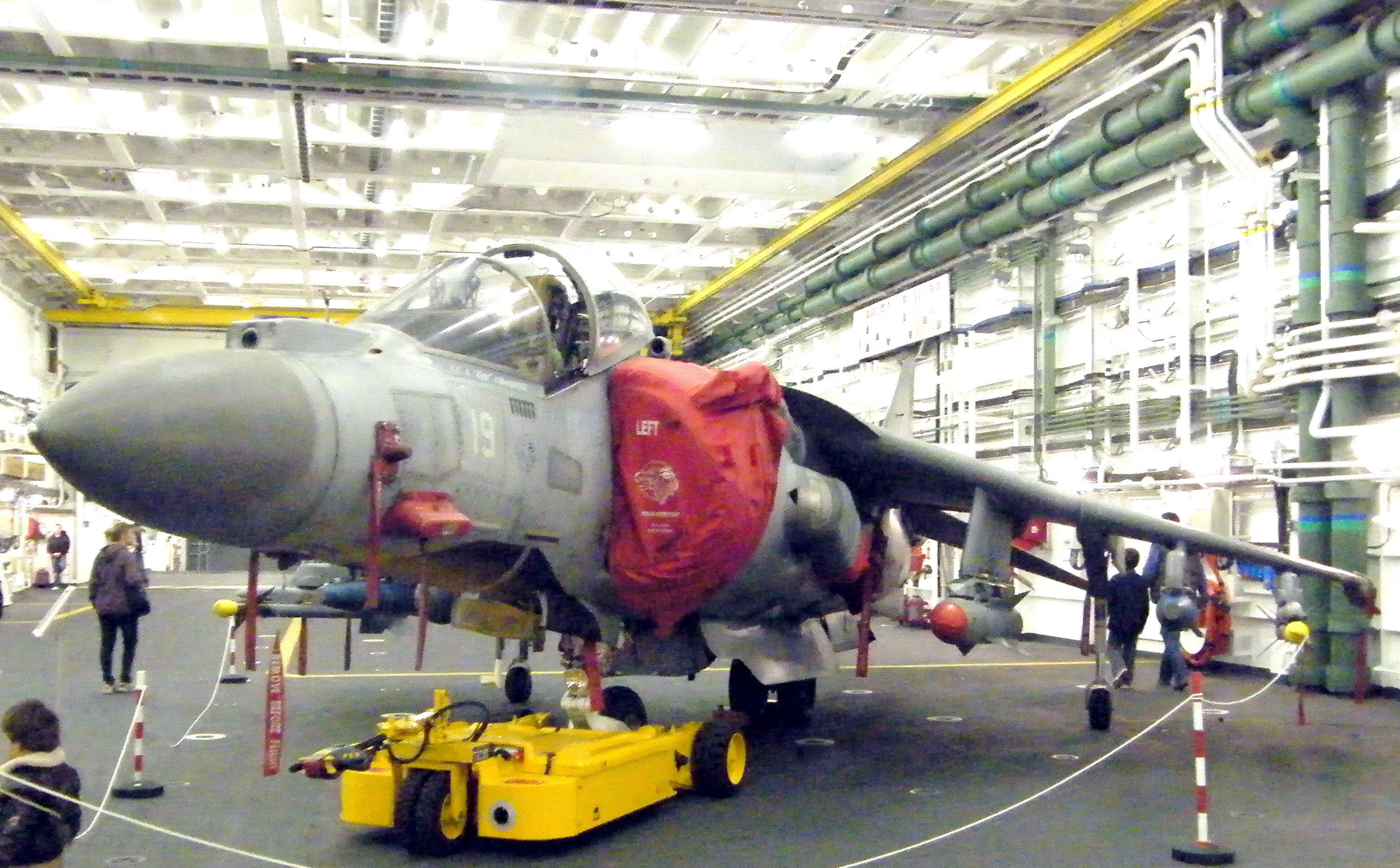 Aereo a decollo verticale Harrier nell'hangar della portaerei Cavour